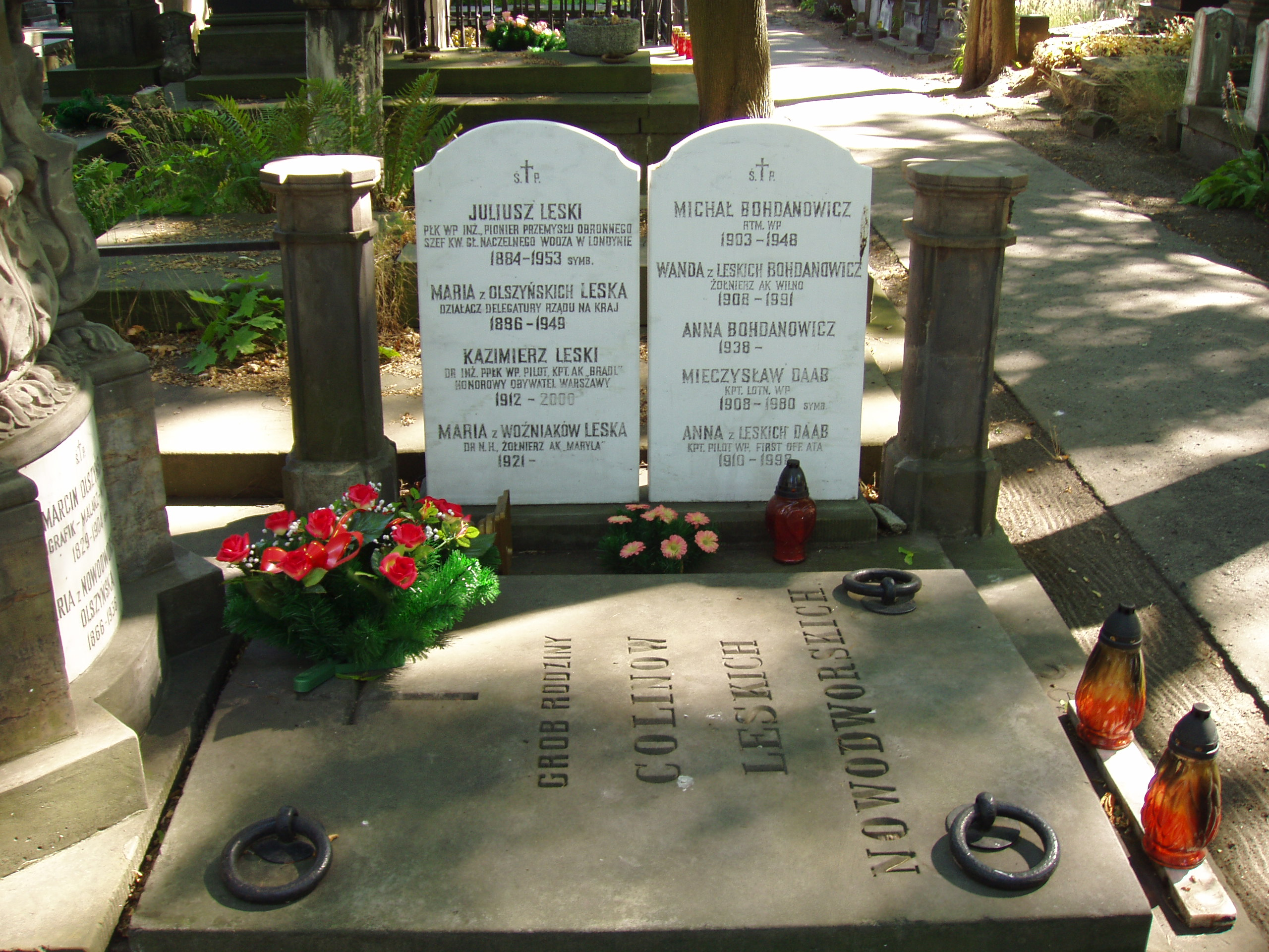 Grób Kazimierza Leskiego i jego rodziny na Powązkach Wojskowych w Warszawie (fot Zu)